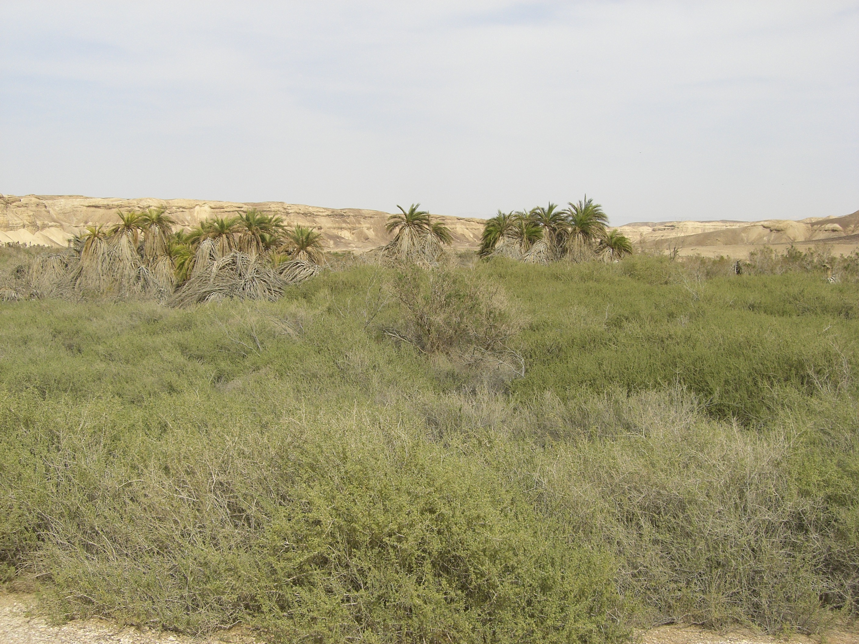 Ein Akrabim, Negev Desert, Israel